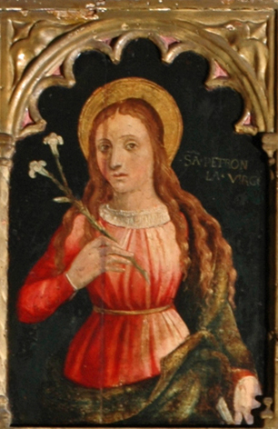 Saint Petronilla (Petronille)